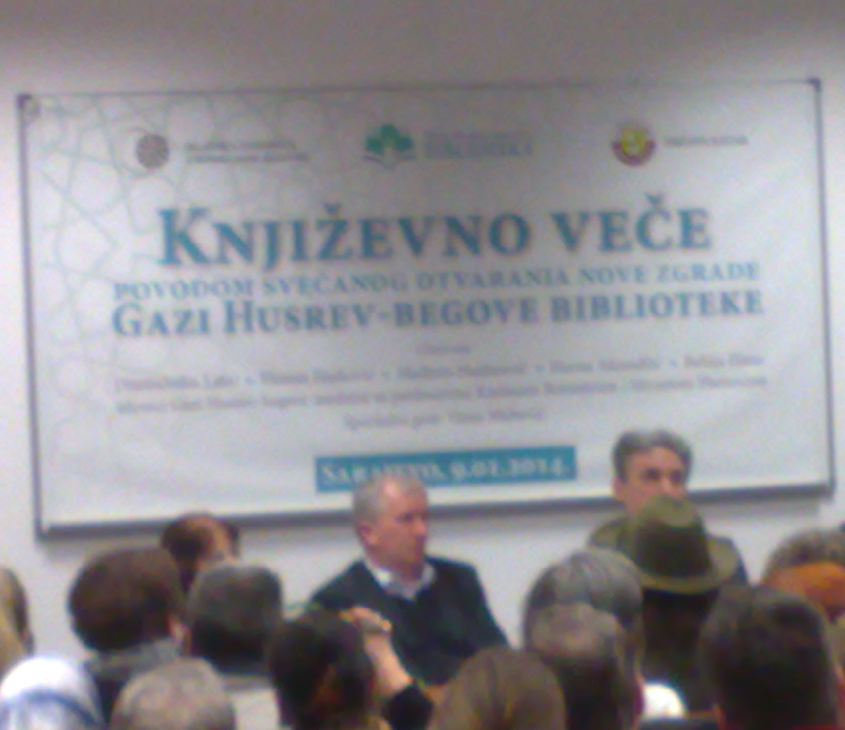 Dzemaludin Latic (lijevo) i Hadzem Hajdarevic (desno)